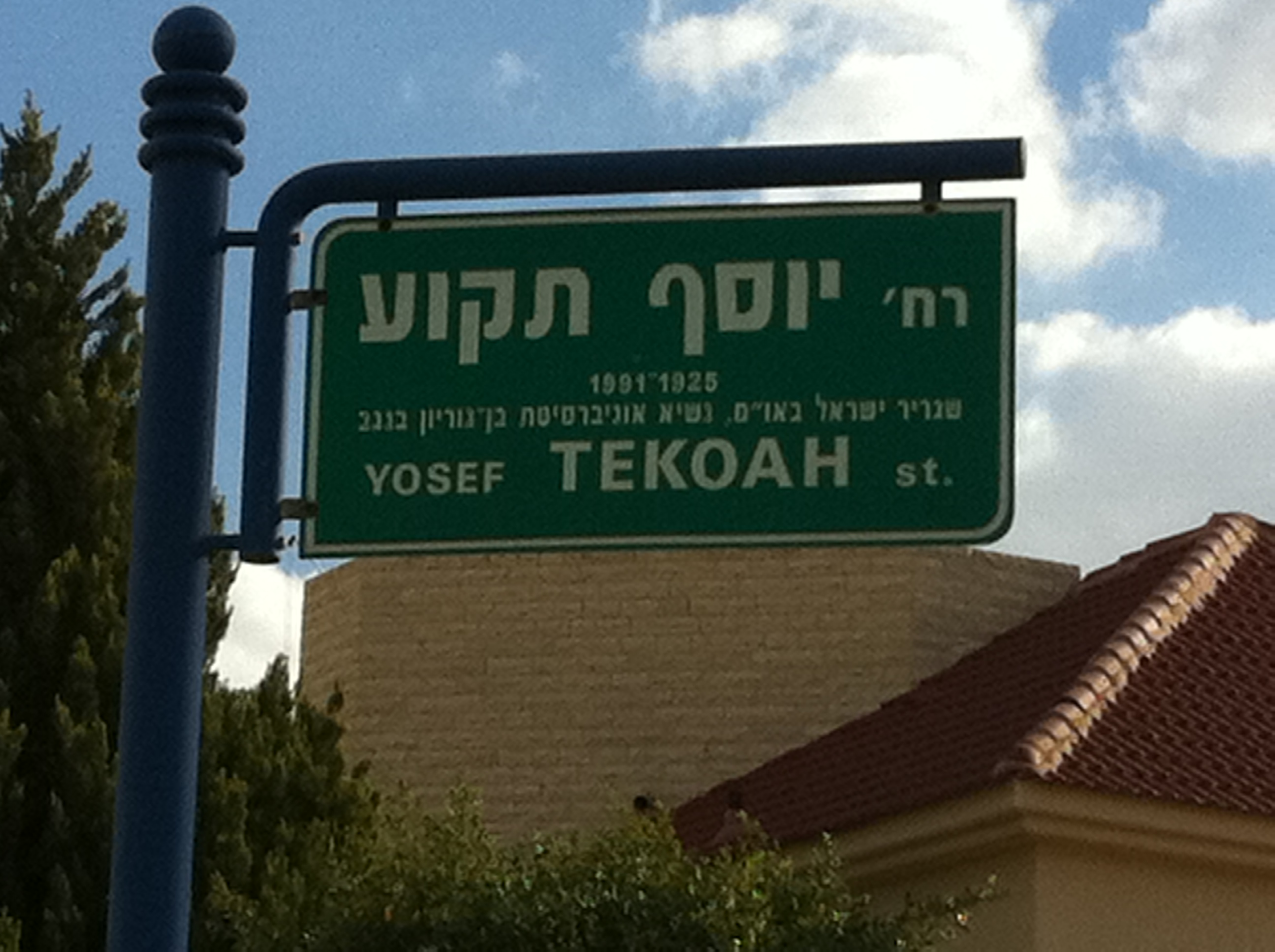 שלט "רחוב יוסף תקוע"בשכונת רמות בבאר שבע